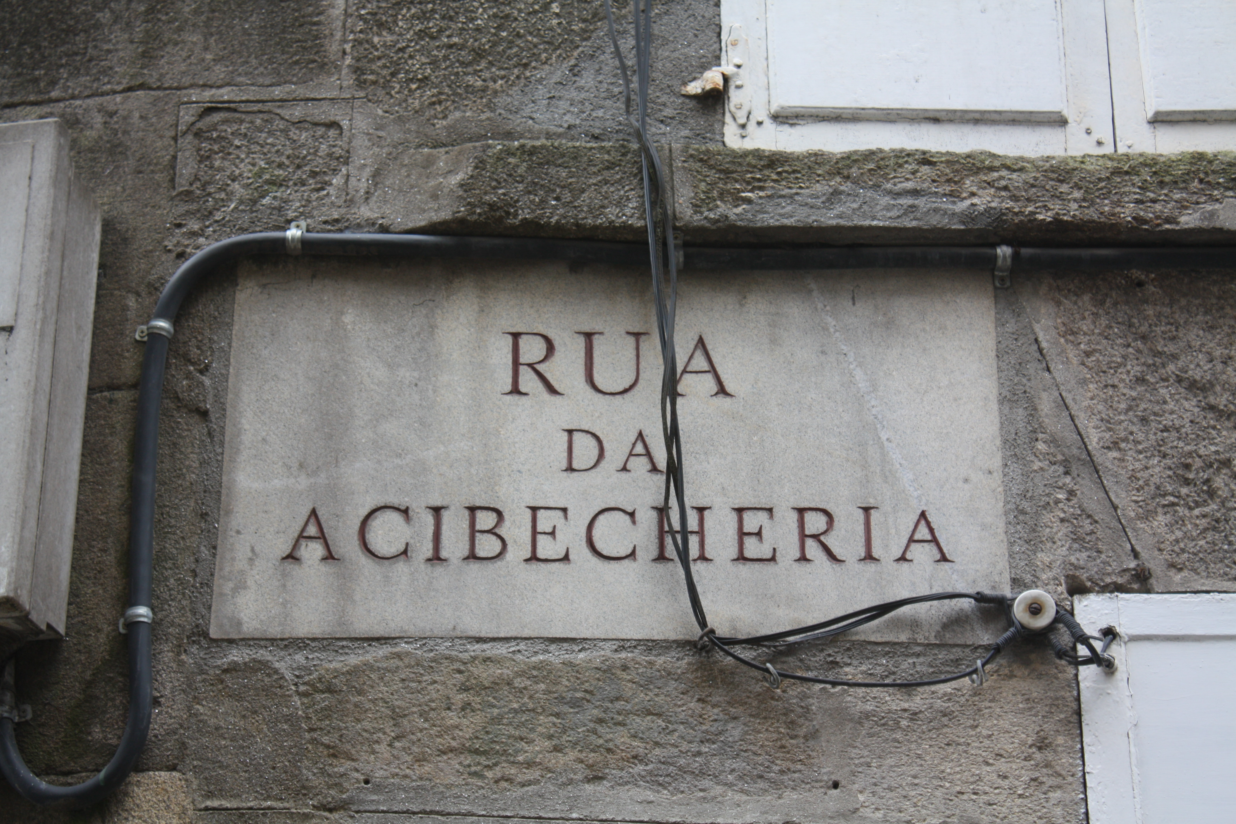 Rúa da Acibecheria, pola que os peregrinos que viñan polo Camiño Francés chegaban á Catedral, á porta do mesmo nome.